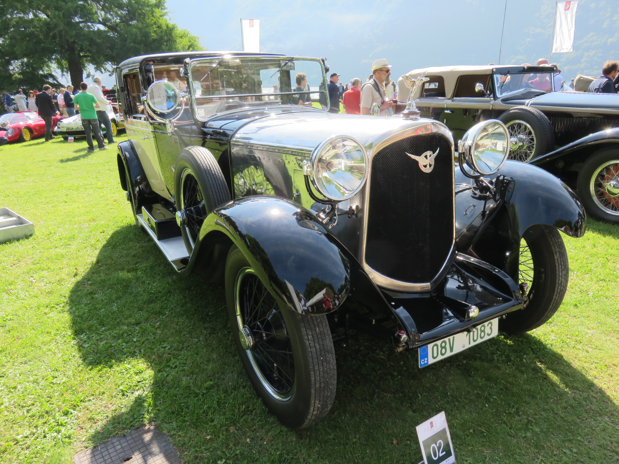 Farman A6B Coupé de Ville Million-Guiet, 1925, concours d'élégance Villa d'Este 2015